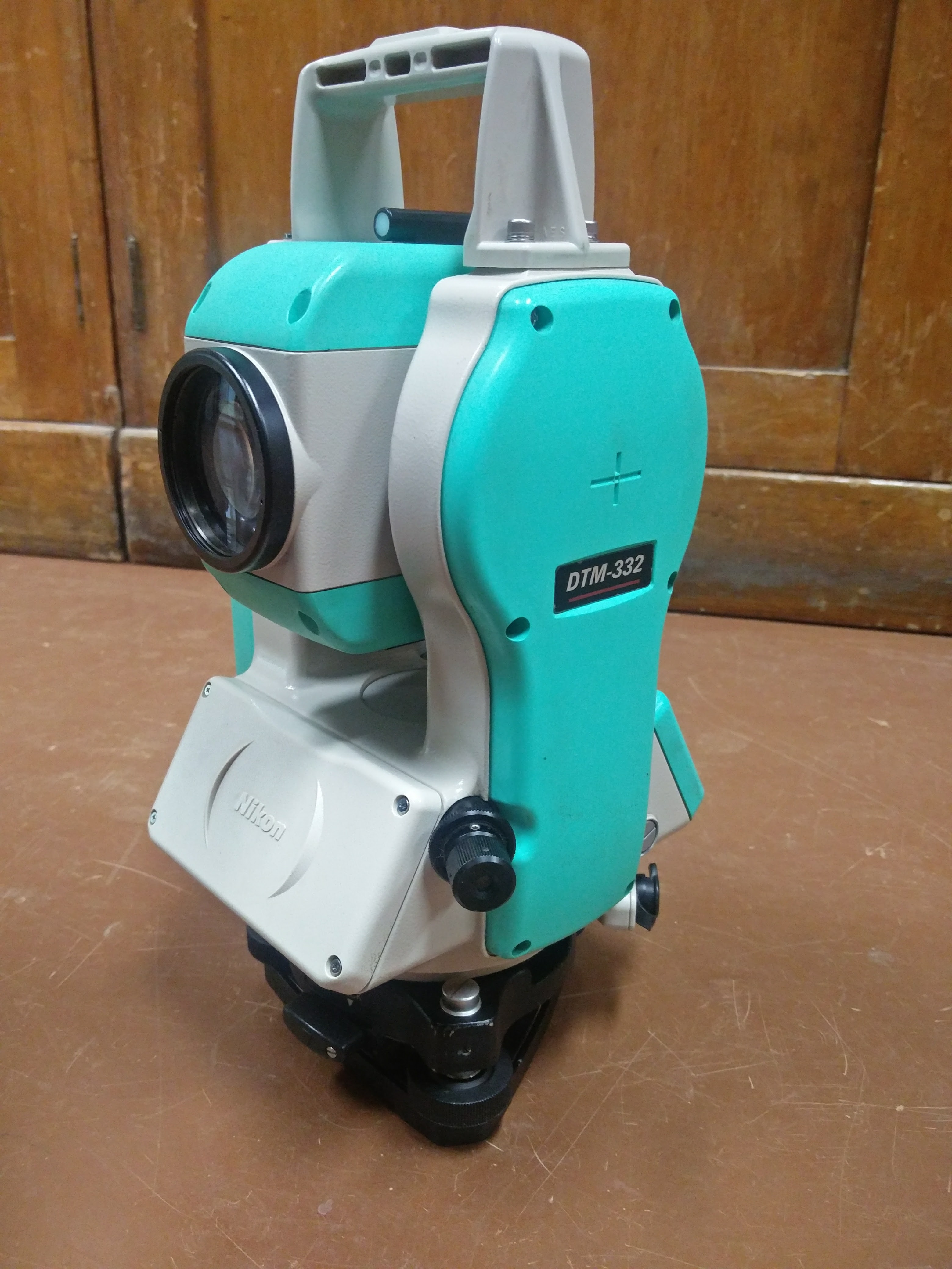 Tahhümeeter Nikon DTM-332 eestvaates